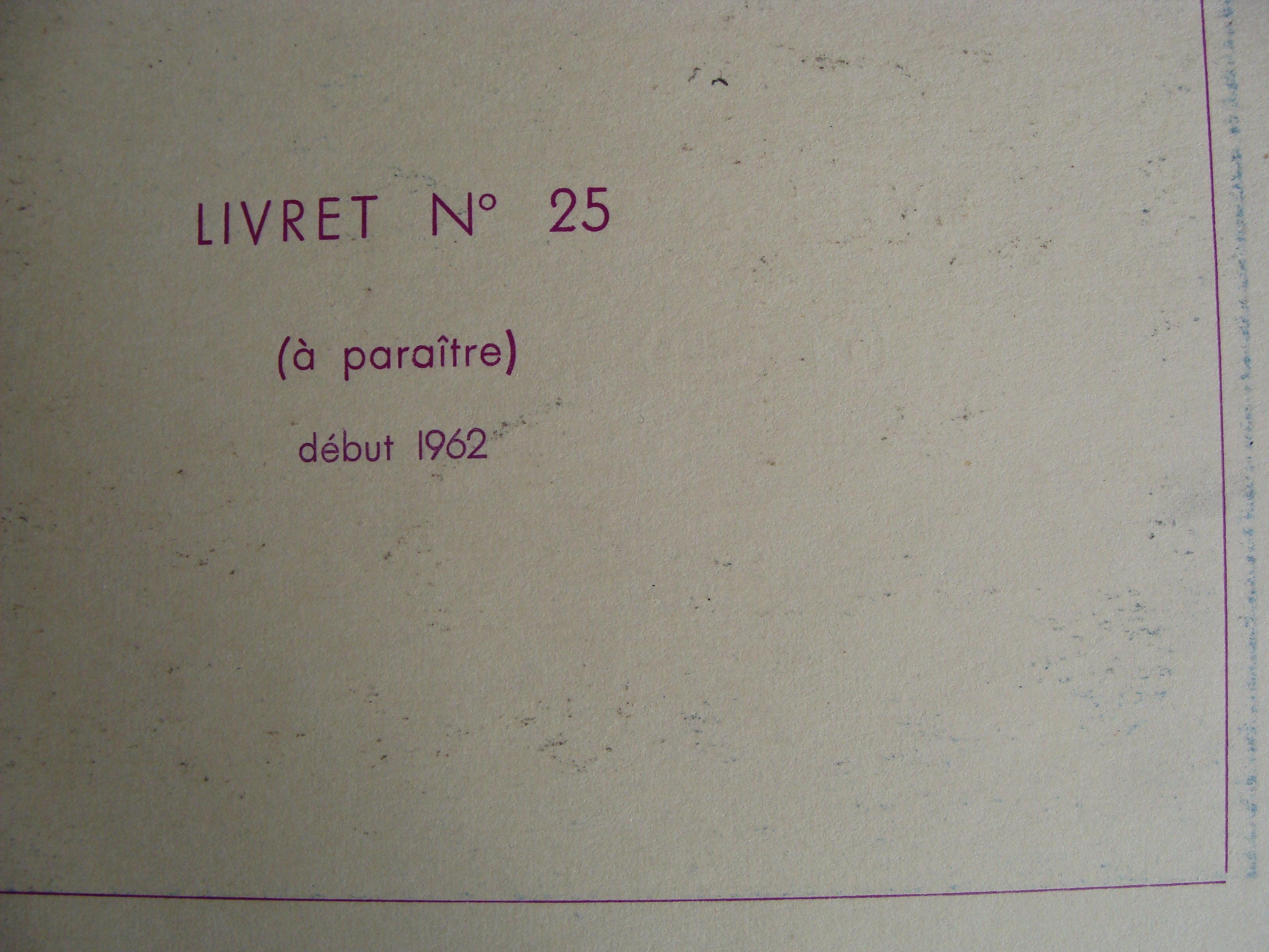 Alors que le catalogue présente les 24 premiers livrets de 16 pages avec couverture apposées sur les pages, dès le n°25 seul le titre et l'année de parution sont précisés. Ce qui démontre que l'année de l'édition de ce catalogue est 1961.